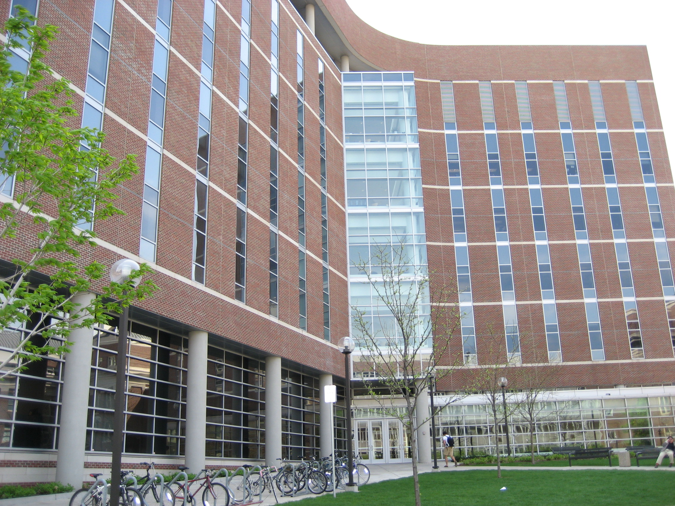 Molecular Cellular Biology Building